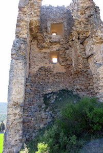 castell de Lloberola a la comarca de la Segarra - Catalunya